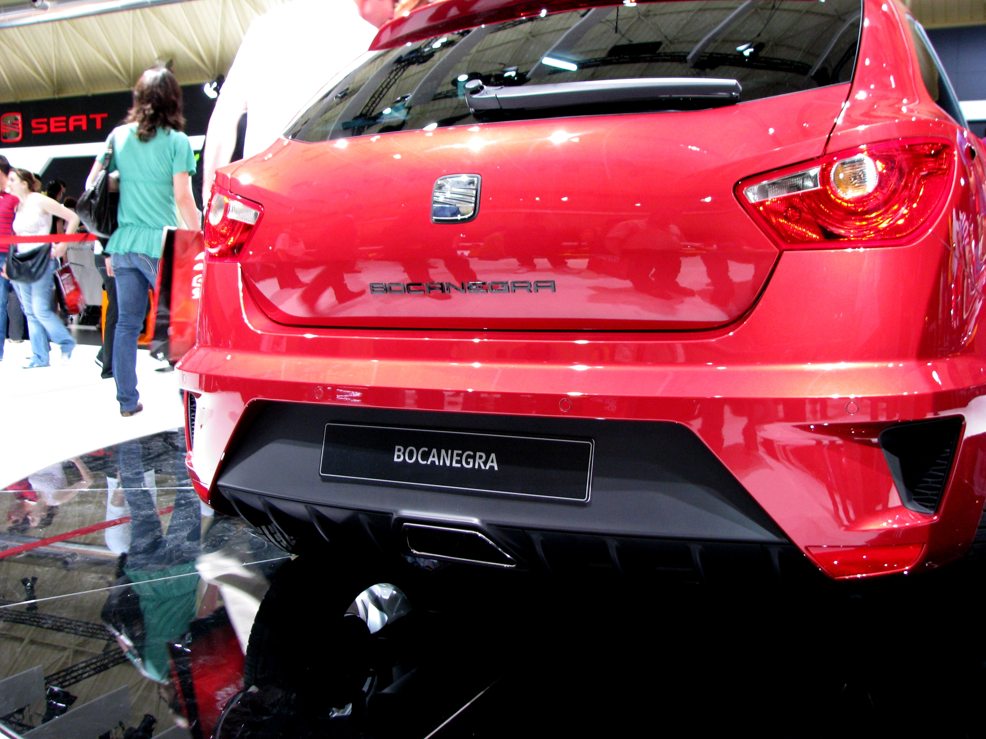 Seat Ibiza Bocanegra en el Salón Internacional del Automóvil de Barcelona 2009